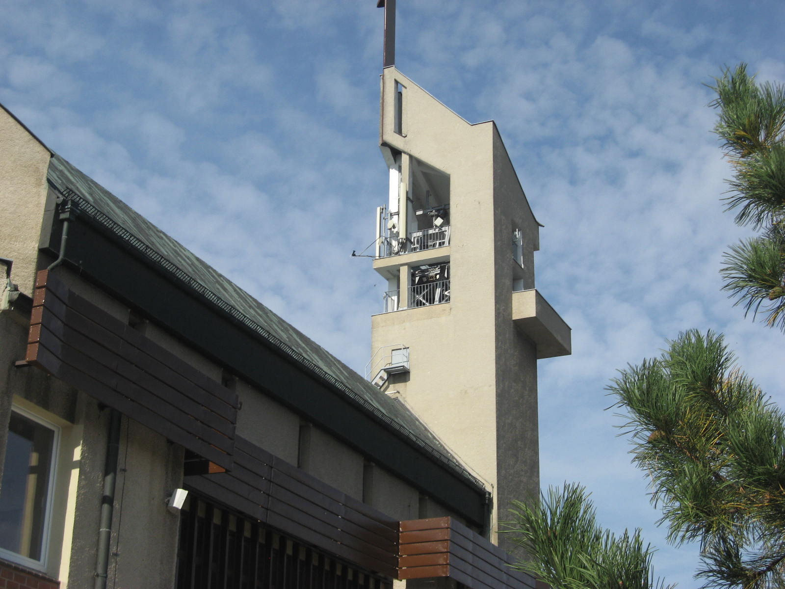 Wieża kościelna 01